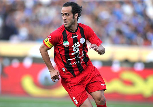 علی کریمی کاپیتان پرسپولیس در دربی 71 / 25 شهریور 1390